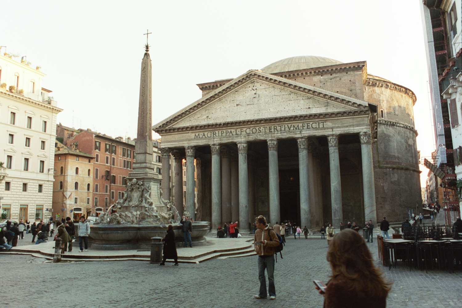 Roma, piazza della Rotonda, obelisco e Pantheon